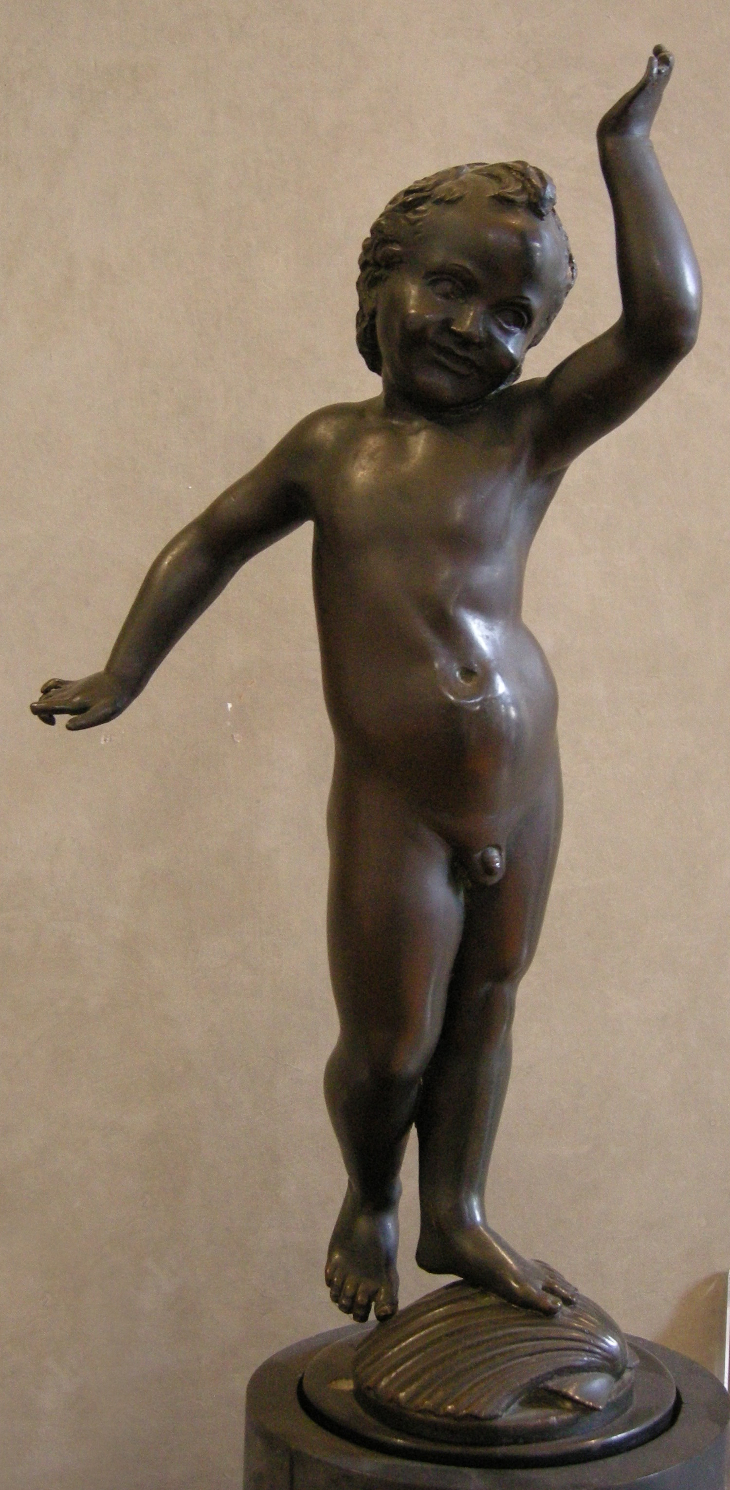 Donatello (attr.) putto danzante